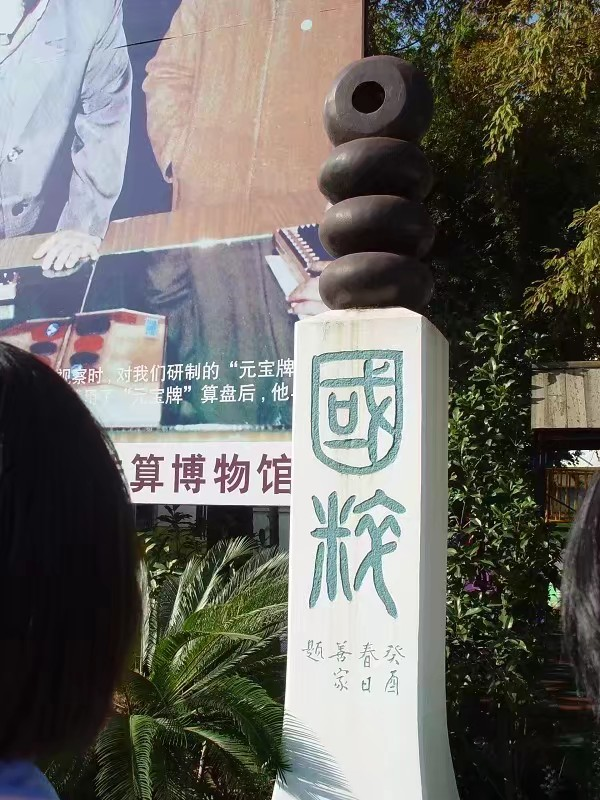 临海国华博物馆写有“国粹”的柱子与四颗算珠